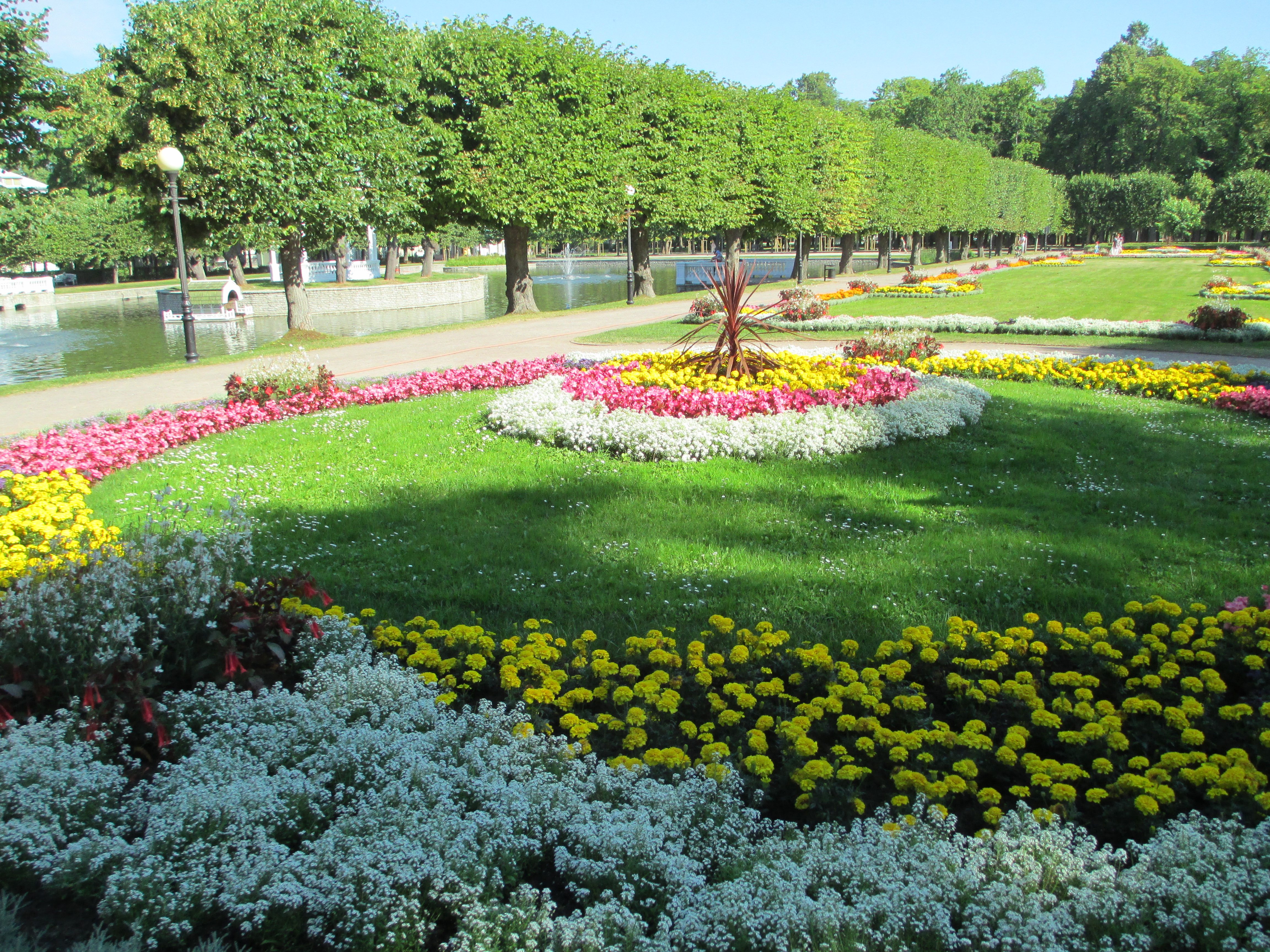 פארק קאדריוג בטאלין